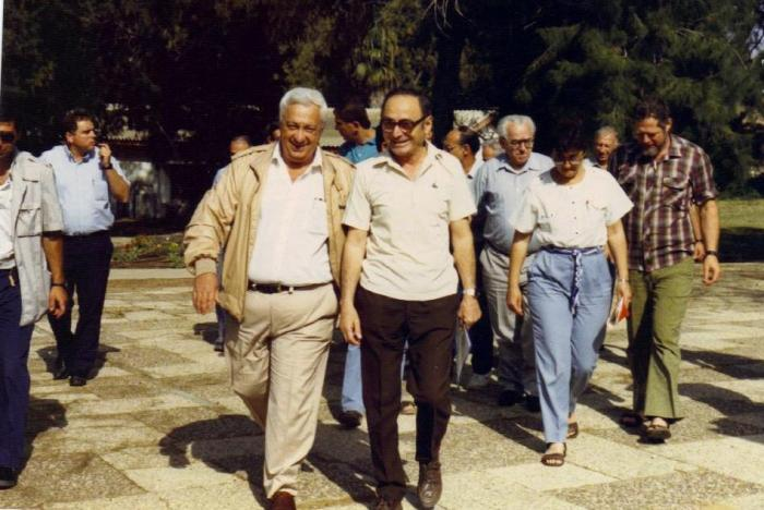 1986 אריק שרון מבקר בבית-חרושת מכסף בניר-עם. לידו מנהל מכסף מתי ברקאי. בין החברים: בטי גברי, גיורא גברי, יצחק חדז'ס, ניסן צורי.